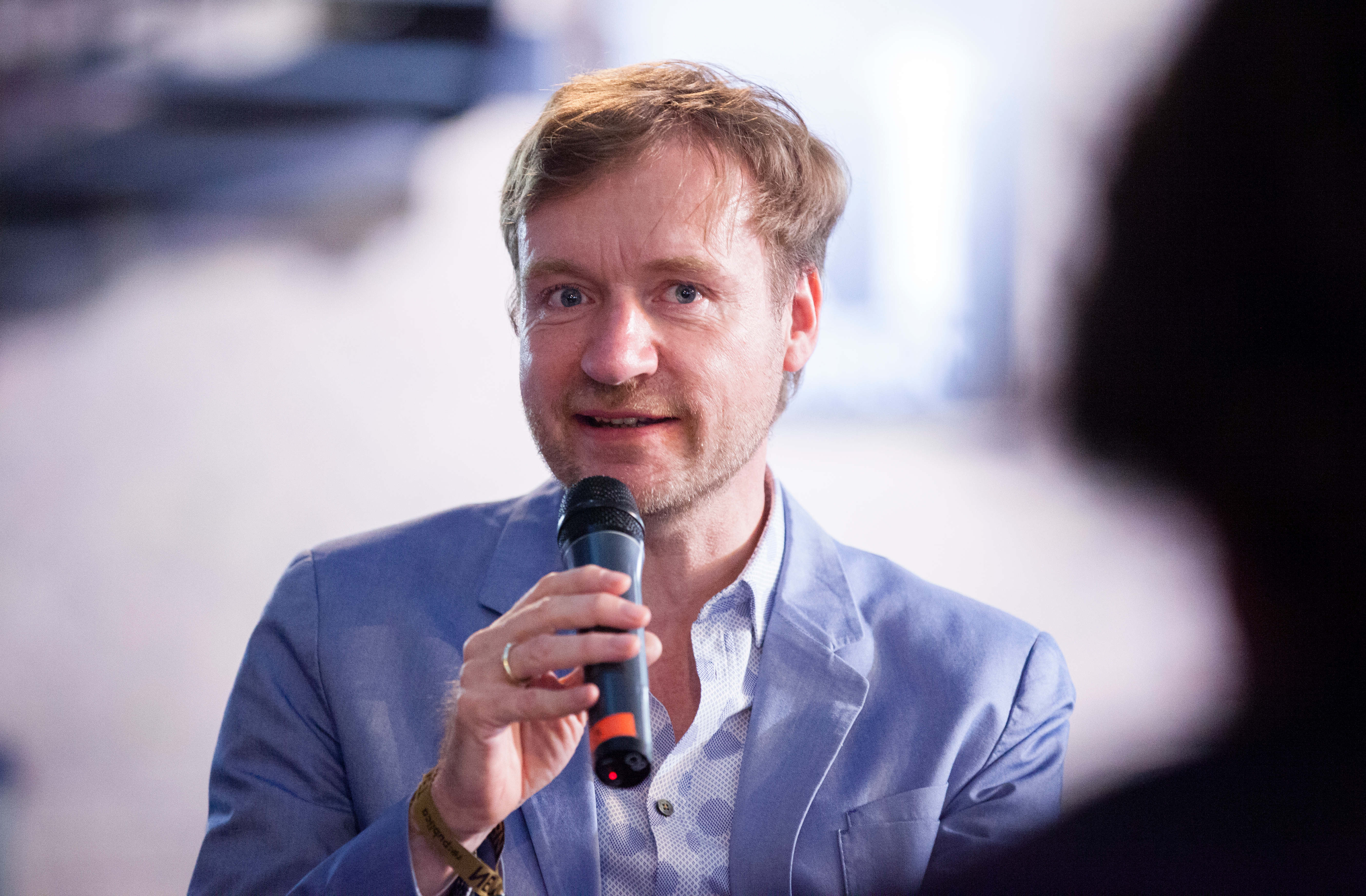 Tim Renner bei „Creatives vs. Kunst: Zerstörung des kreativen Ökosystems?“ am 03.05.2016 auf der re:publica in Berlin. Foto: re:publica/Jan Michalko CC BY 2.0